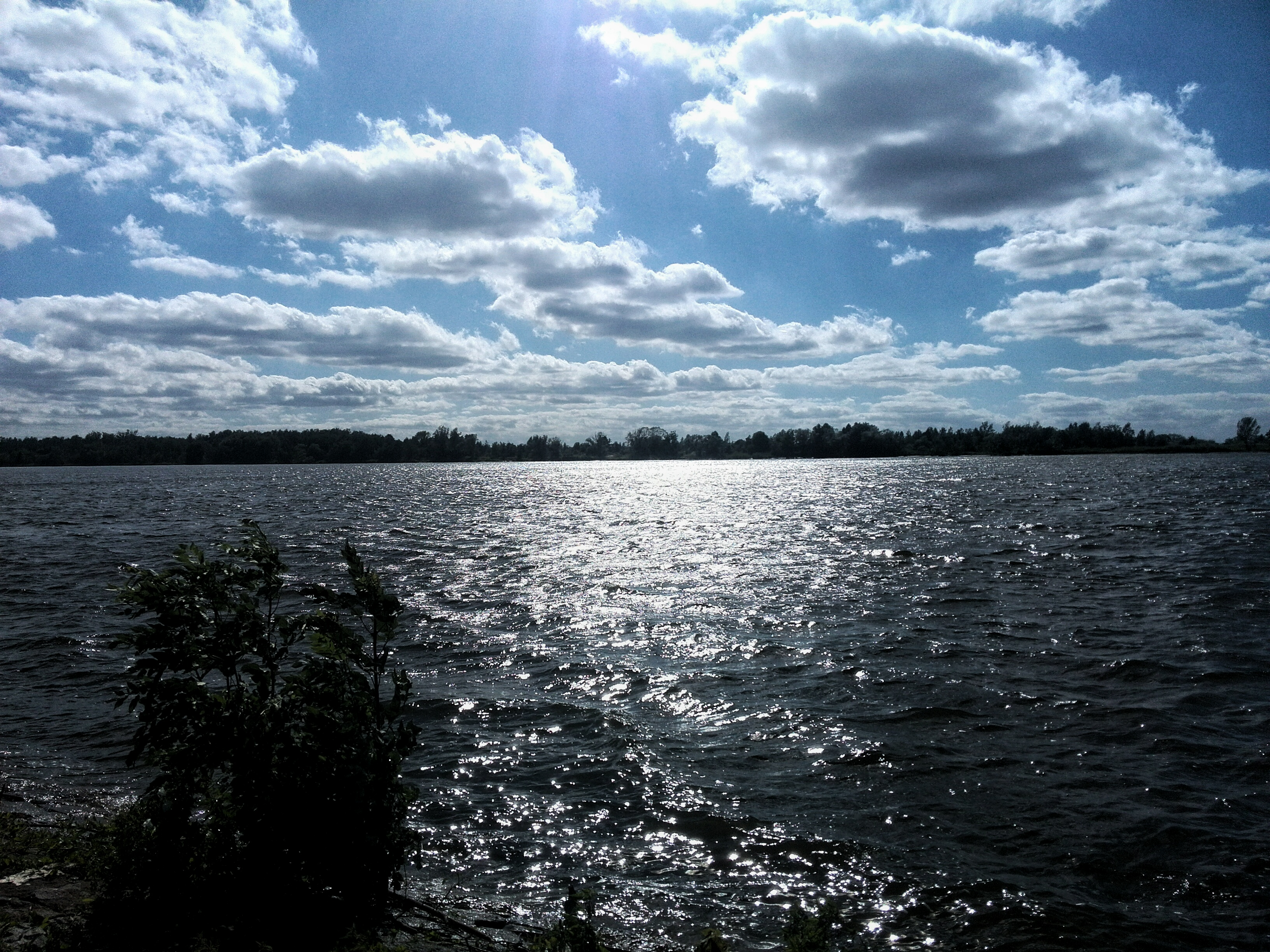 Wisła w Mikoszewie